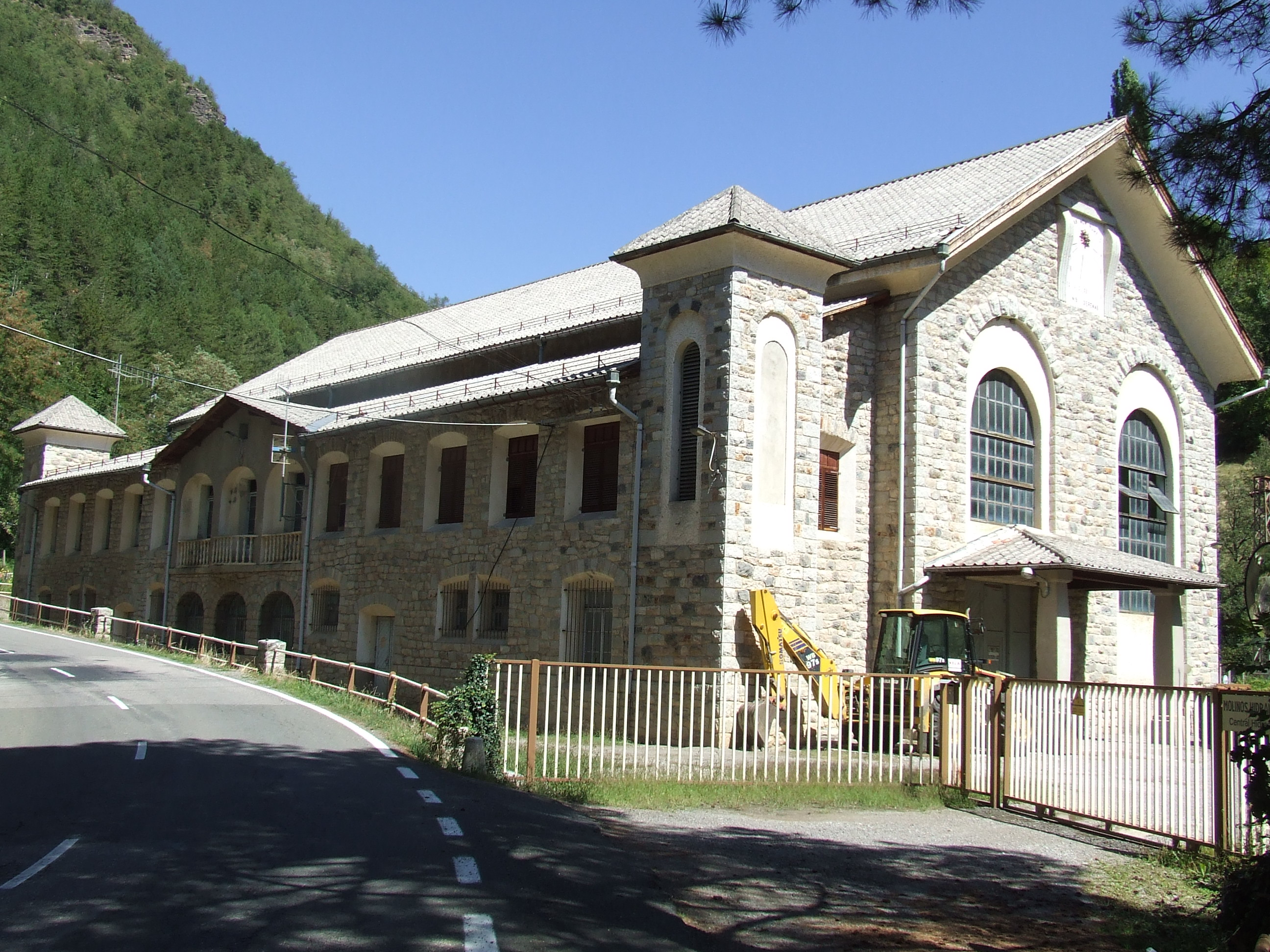 La Central Elèctrica de Molinos (la Torre de Cabdella, Pallars Jussà)